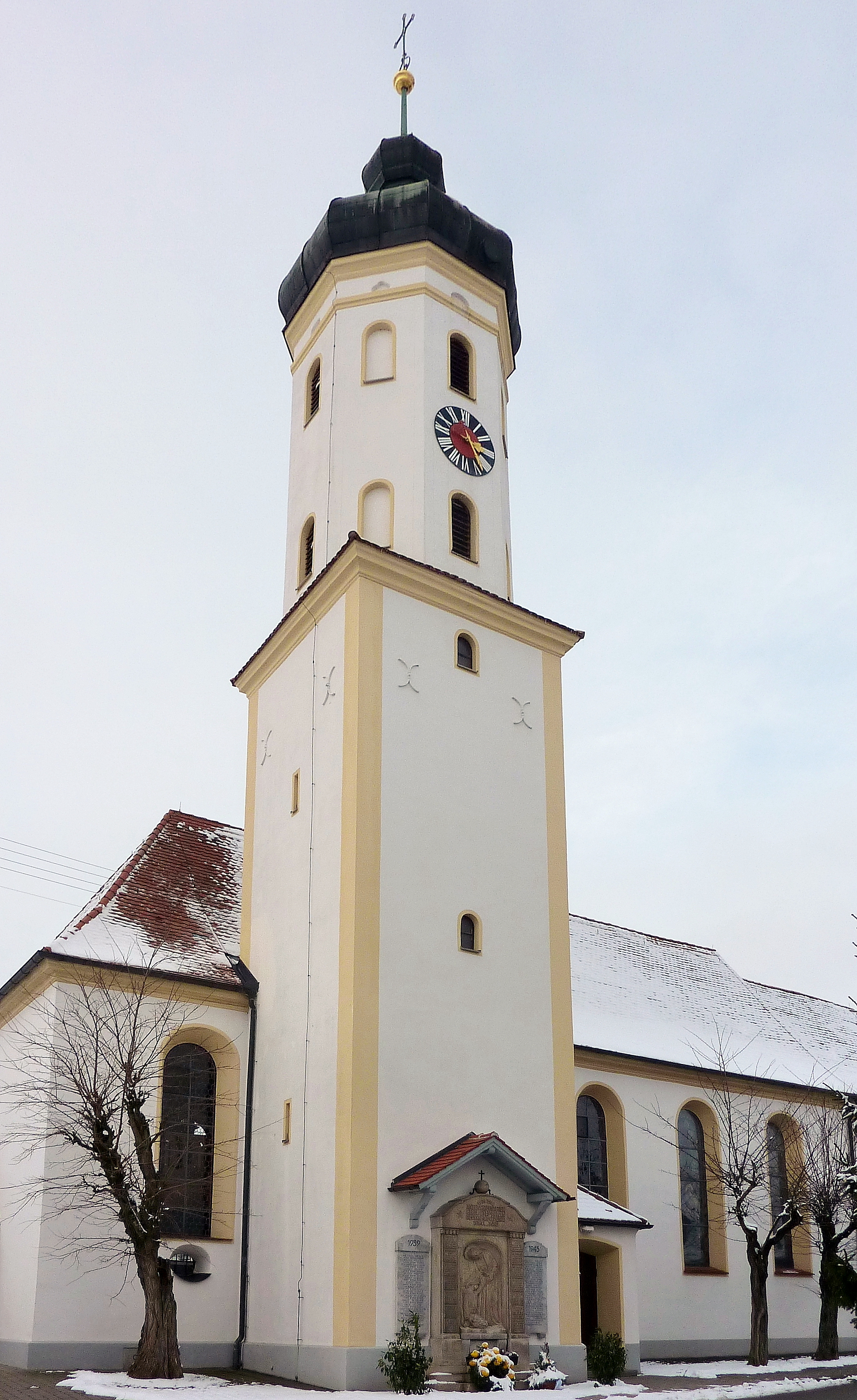 Katholische Pfarrkirche Mariä Himmelfahrt in Bachhagel, einer Gemeinde im Landkreis Dillingen an der Donau (Bayern), Ansicht von Süden]